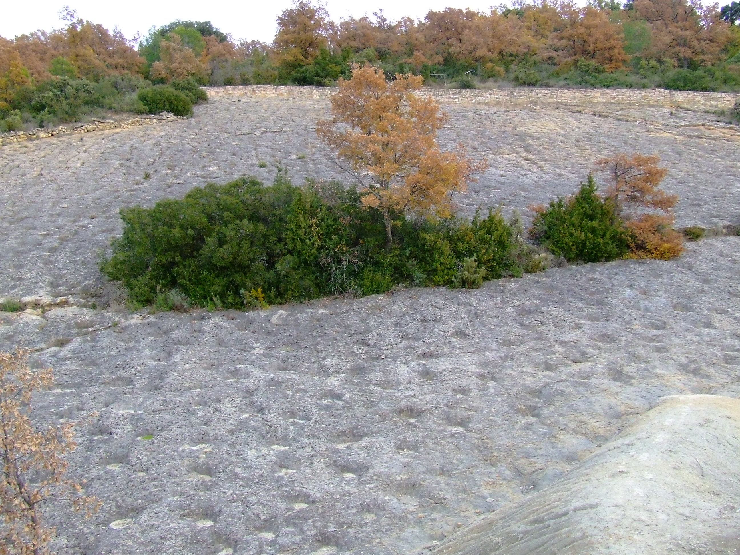 El Parc Cretaci de la Posa (Isona, Isona i Conca Dellà, Pallars Jussà)